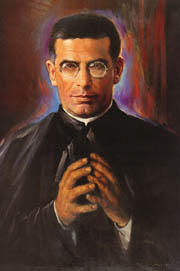 bł. ks. Józef Tymoteusz Giaccardo